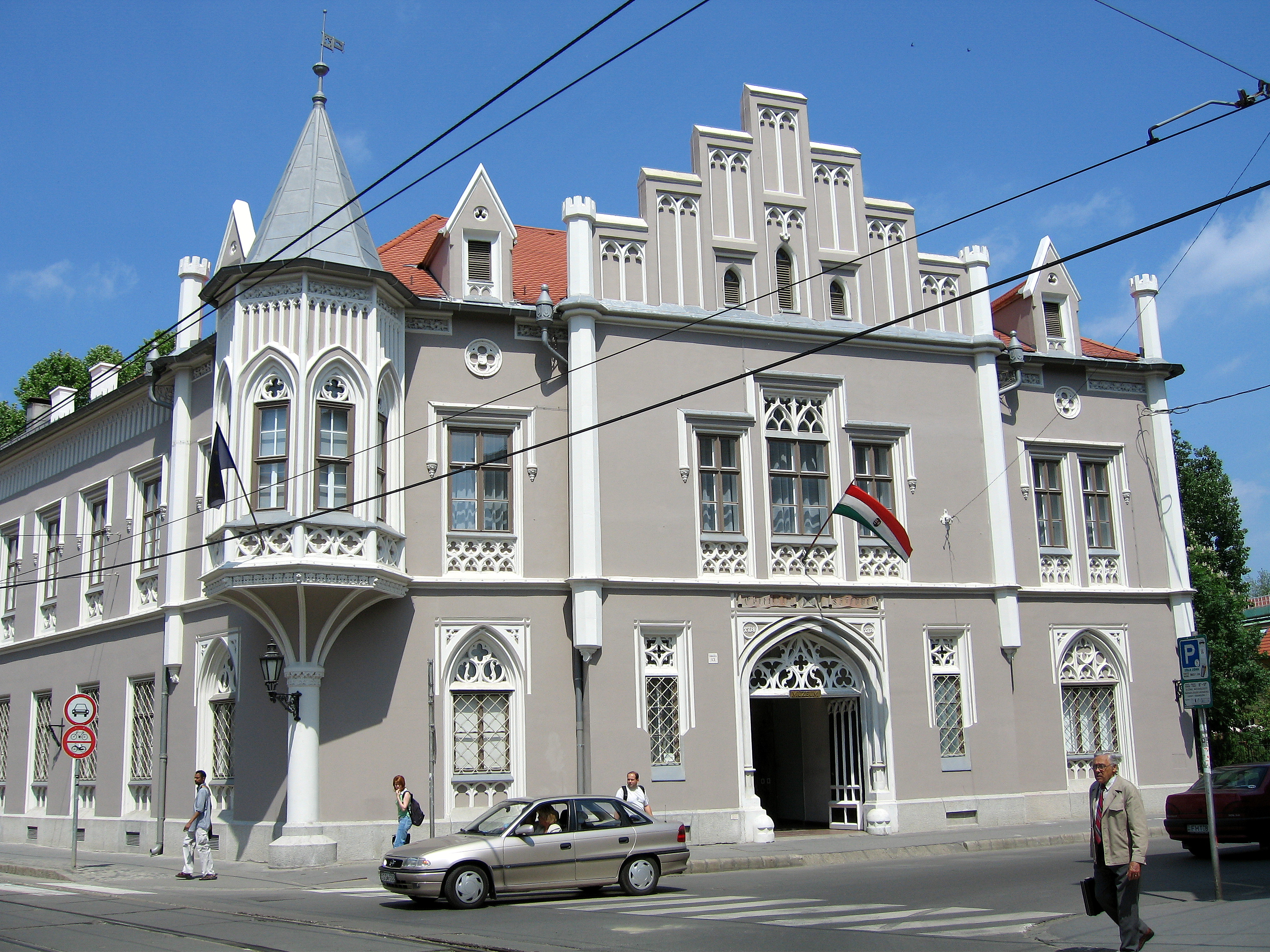 Szeged belvárosa: Fekete ház, épült 1857-ben (tervezője Gerster Károly építész)